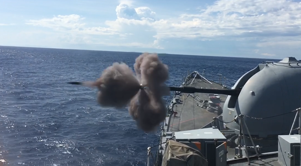 Arquivo liberado pela Marinha do Brasil através de projeto GLAM com Wiki Educação Brasil